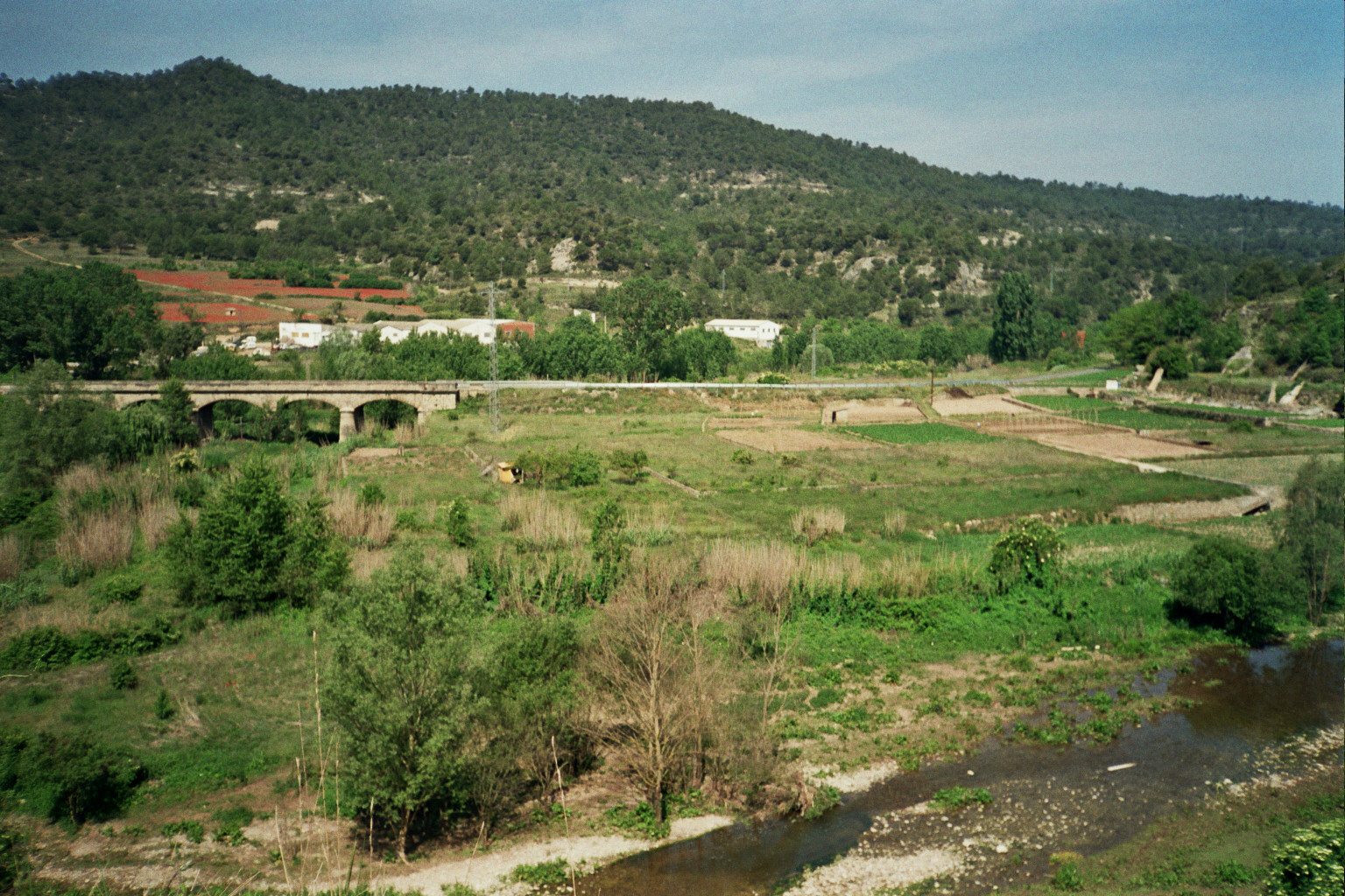 Els Horts dels Pins (Monistrol de Calders, Moianès)